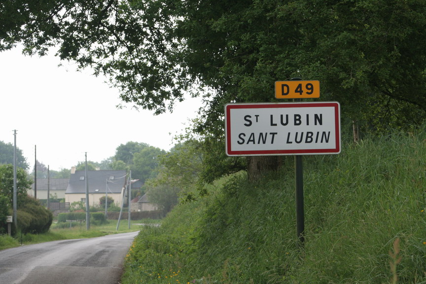 Panneau d'entrée à Saint-Lubin, commune de Kergrist-Moëlou, Côtes d'Armor (22)